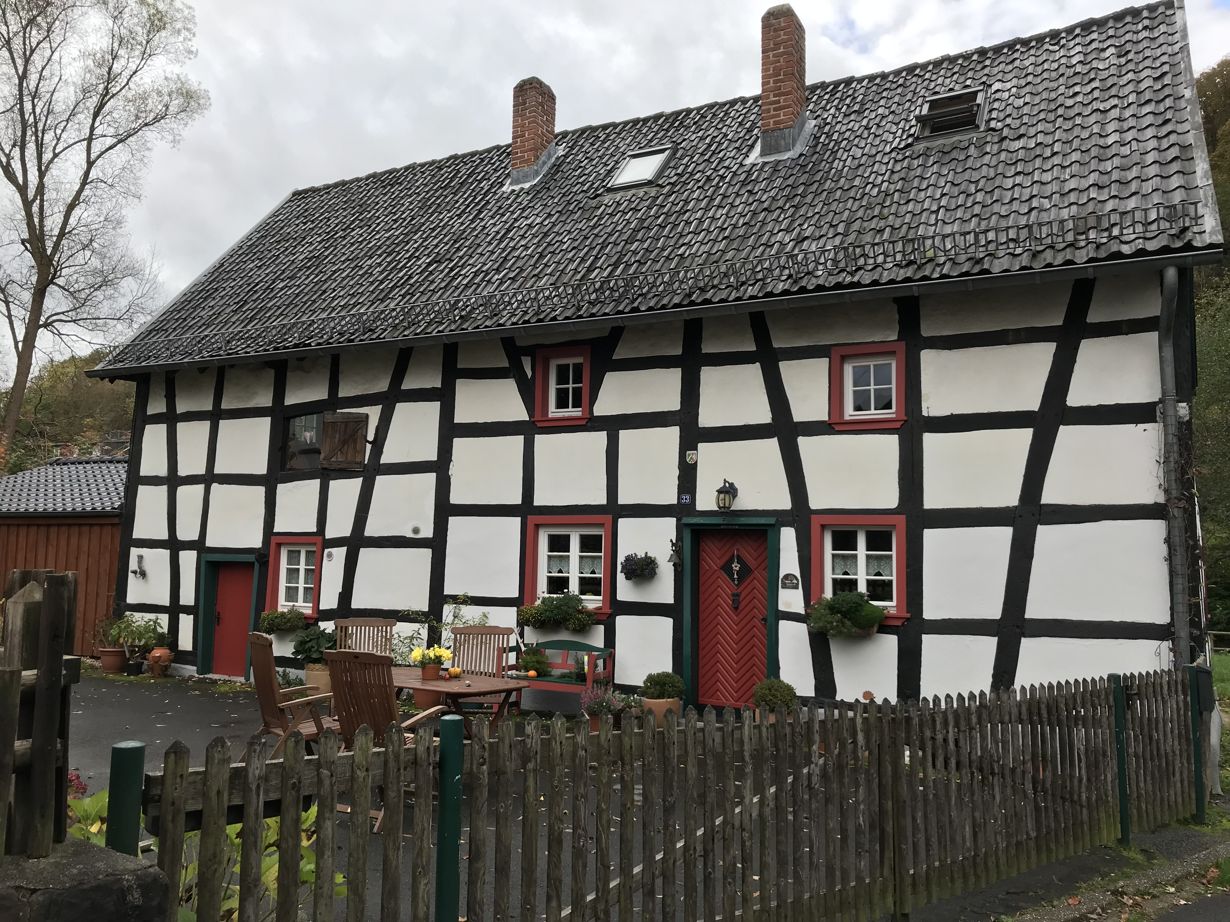 Olef Typisches Fachwerkhaus